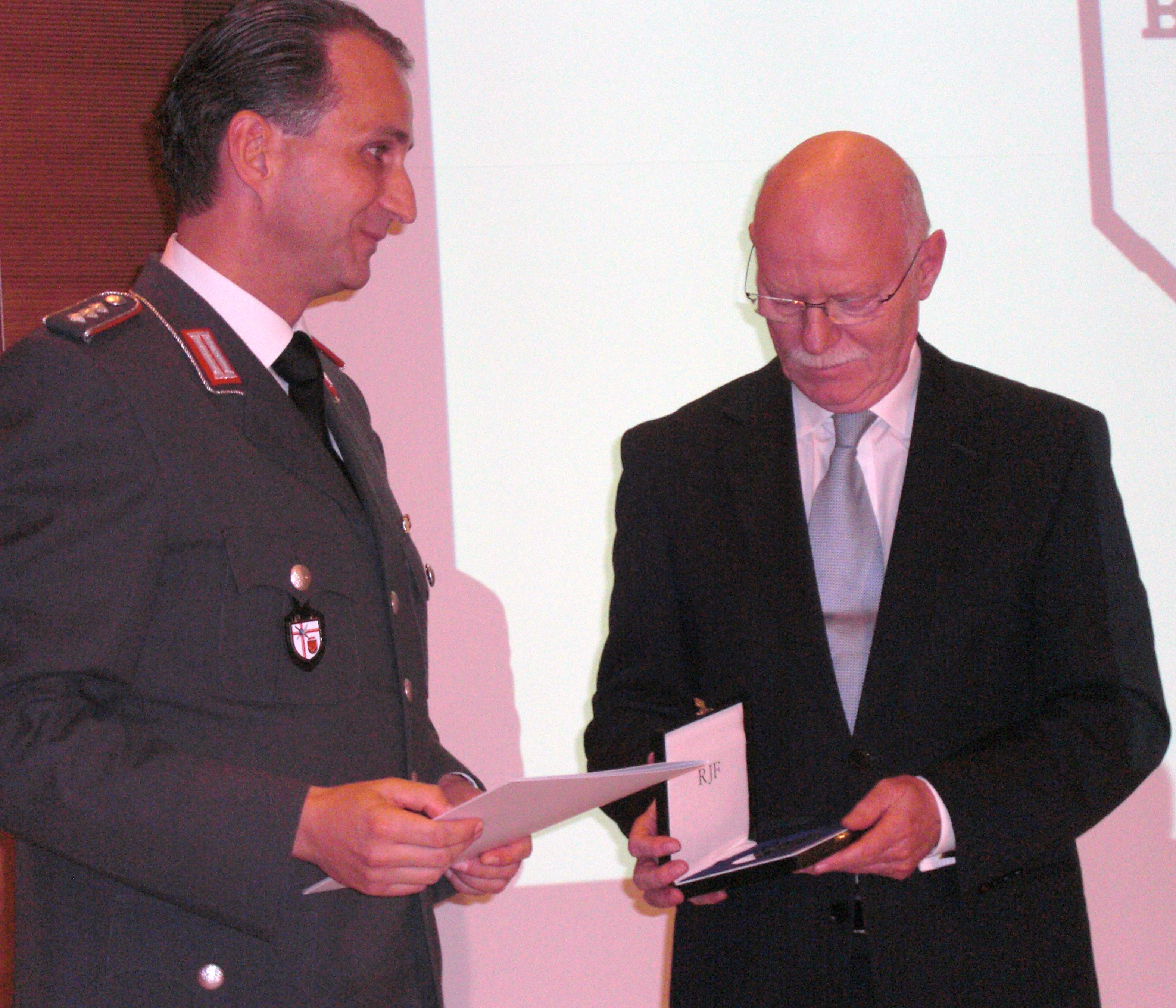 Übergabe durch Hauptmann Michael Berger, Bund jüdischer Soldaten, an Dr. Peter Struck (gest. 2012)